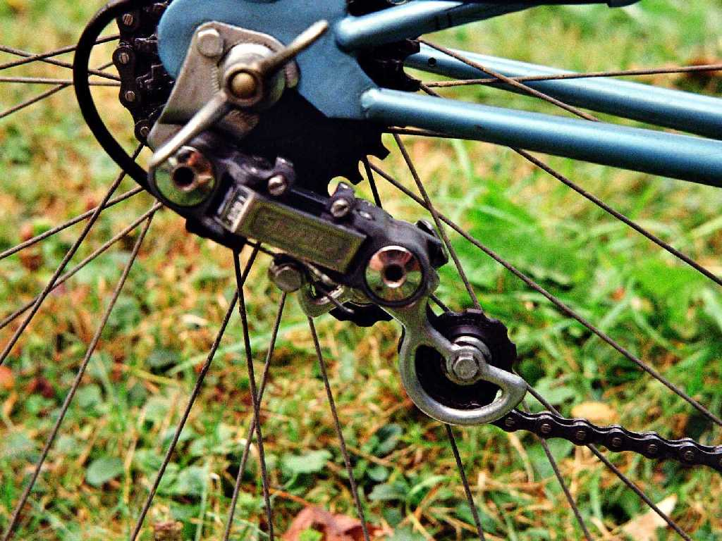 Derailleur Simplex (c.a. 1975)